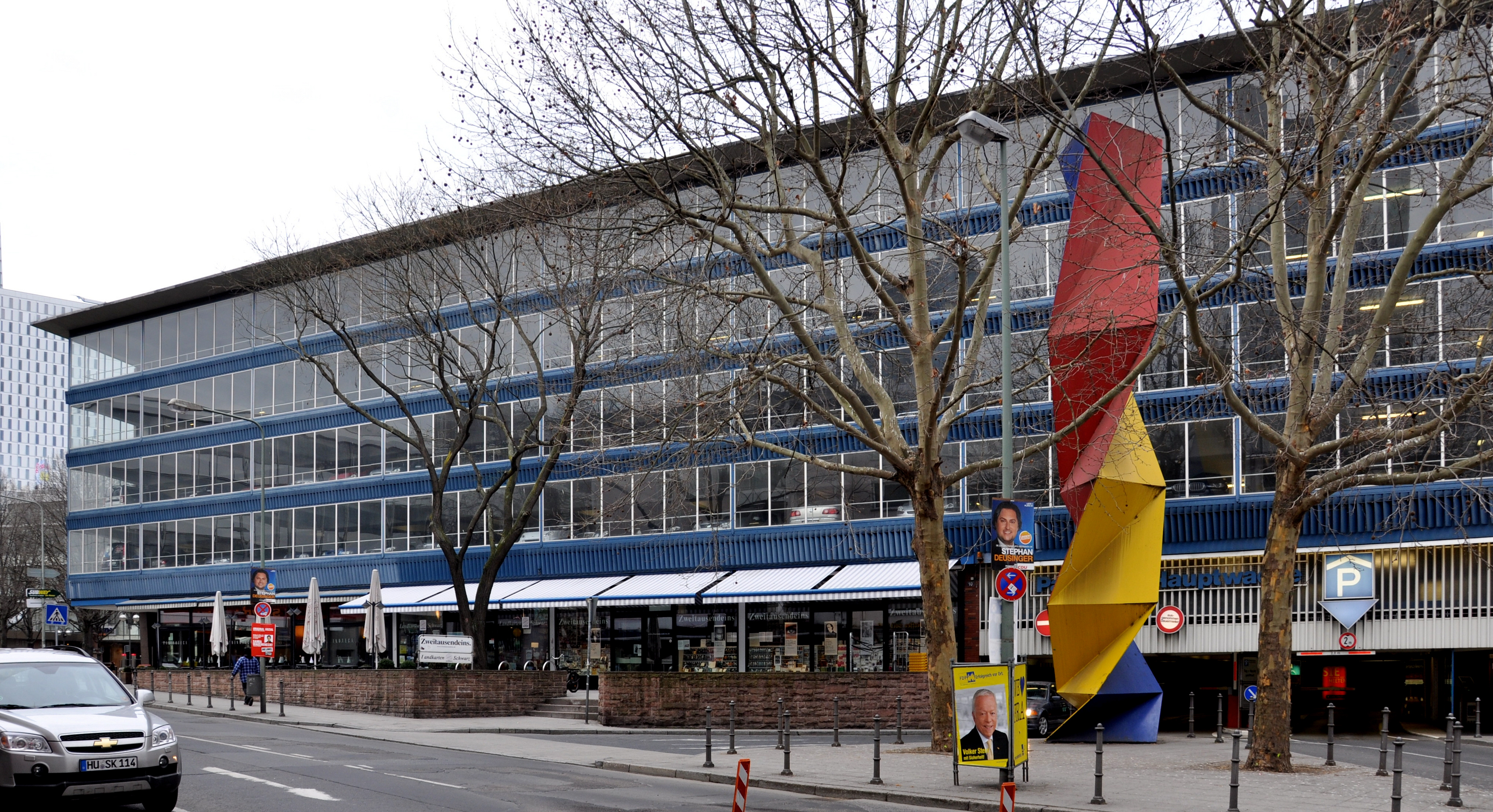 Frankfurt am Main, Parkhaus Hauptwache mit Skulptur „Modulor“ (1993) von Eberhard Fiebig